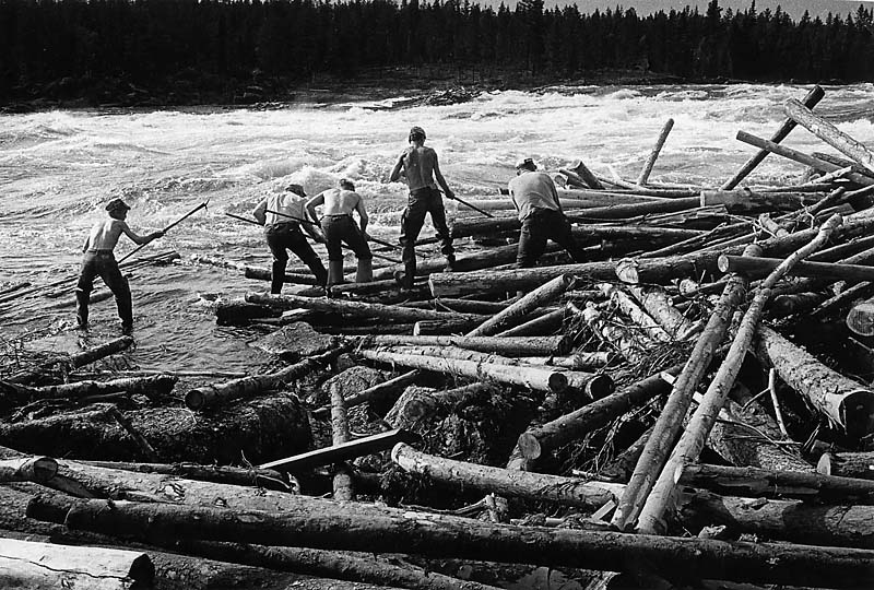 Flottning.; Flodlandskap; Miljöer